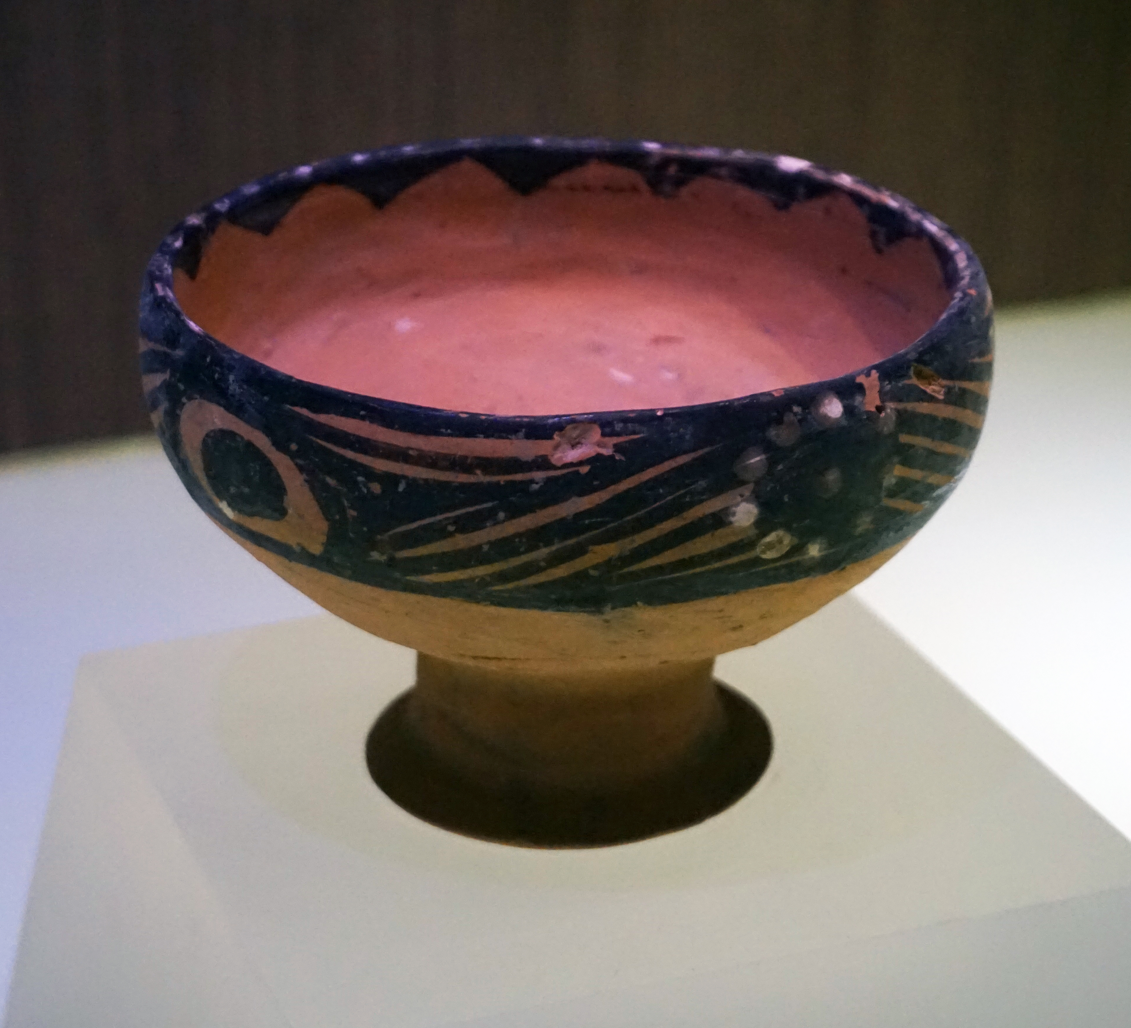 黑白彩豆，马家窑文化马家窑类型。